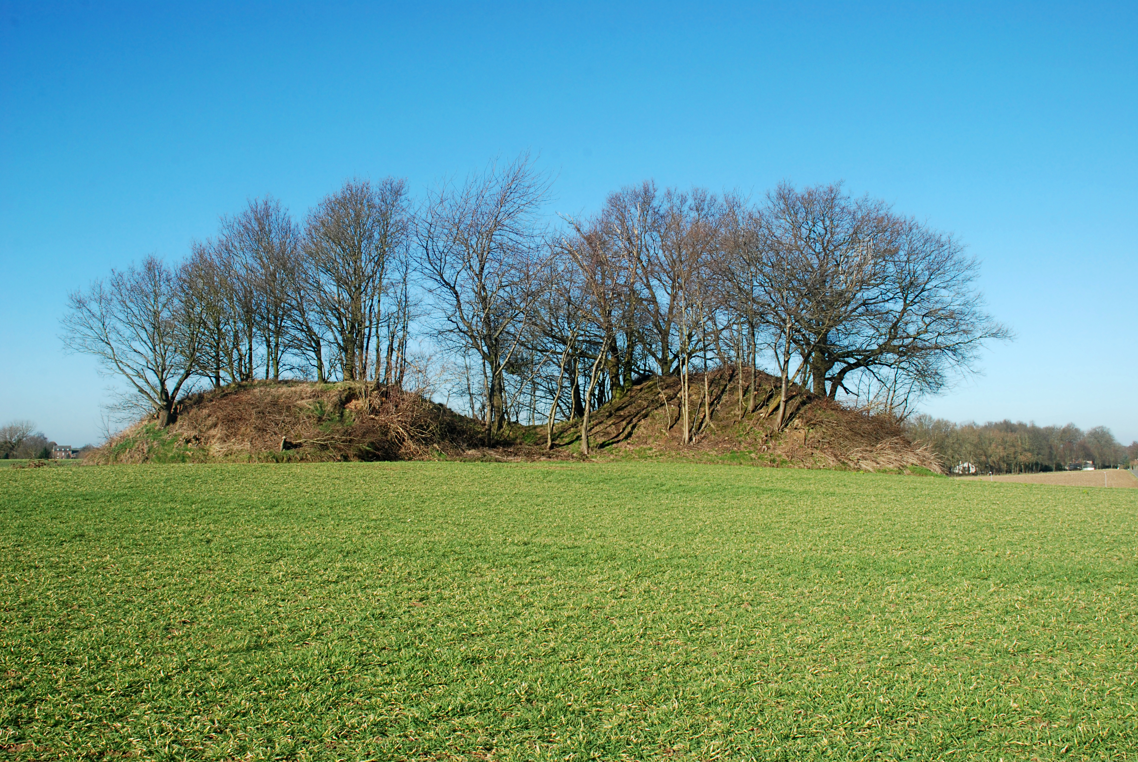 Belgique - Brabant wallon - Chastre - Cortil-Noirmont - Tumuli de Noirmont